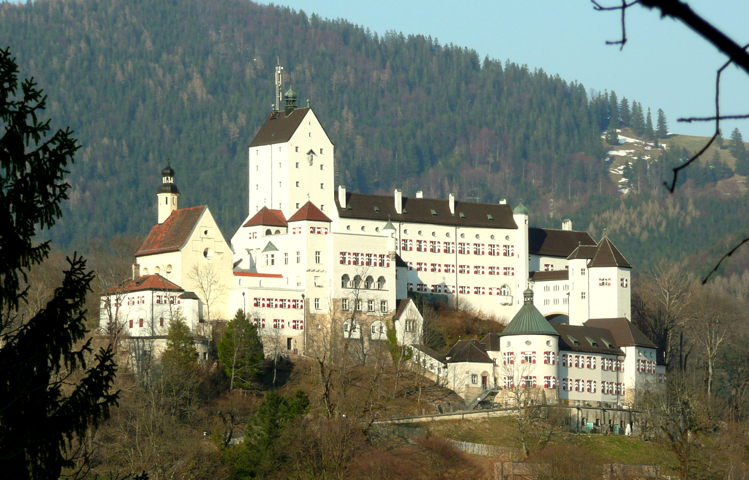 Ansicht des Schlosses Hohenaschau aus etwa südwestlicher Richtung. Das Bild wurde nachbearbearbeit.